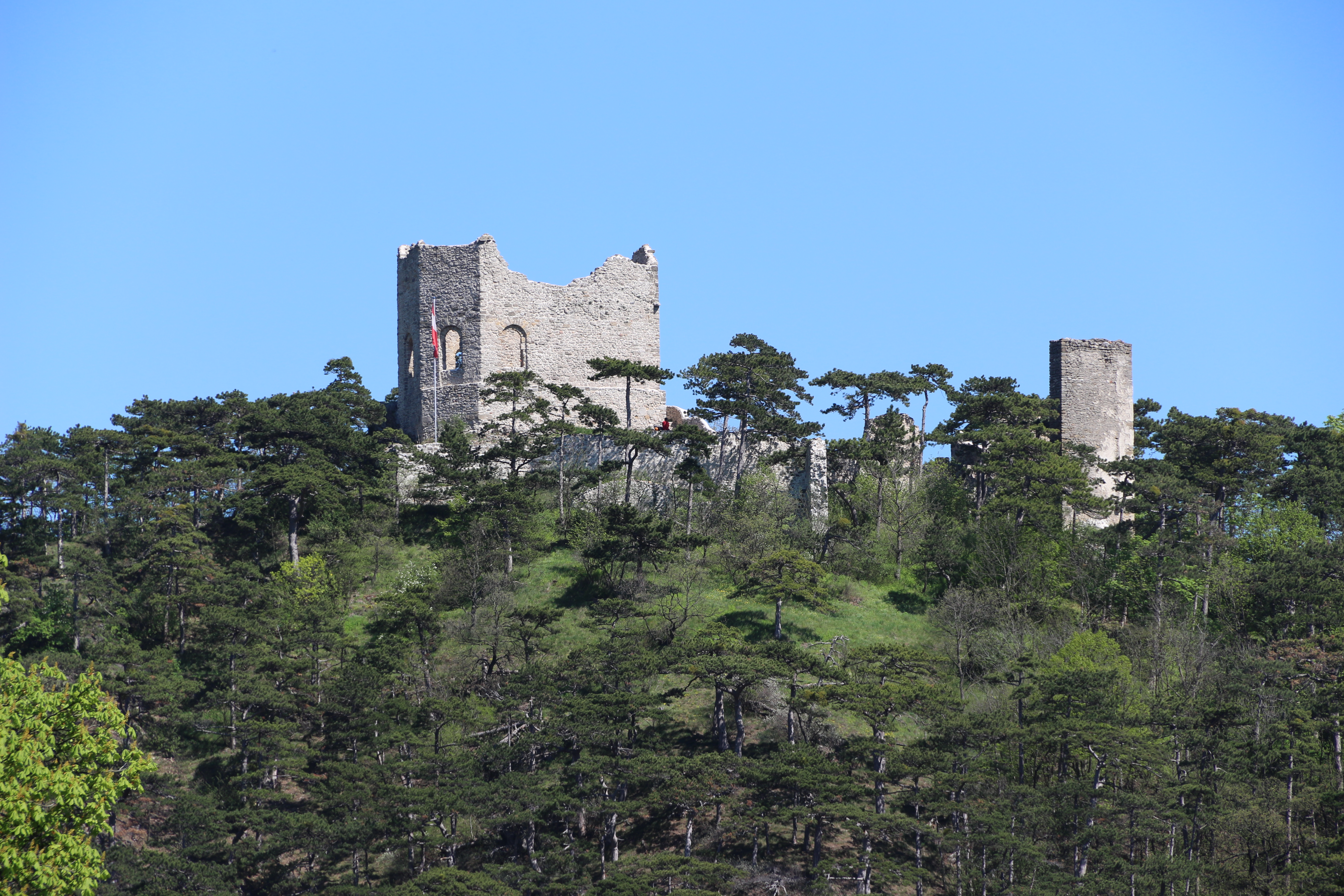 Ruine Mödling, gesehen von der Meiereiwiese (Südwesten), im April 2016.